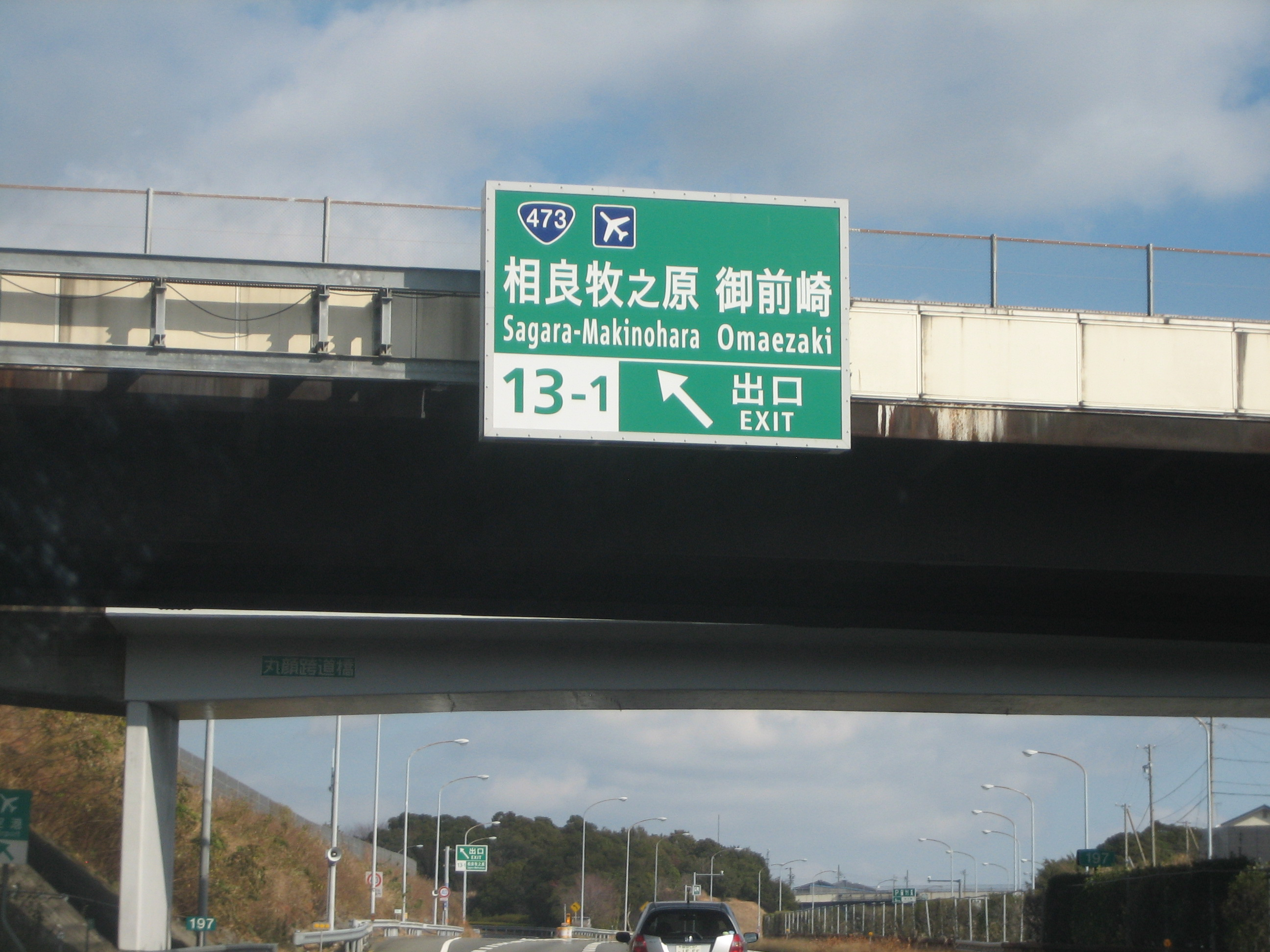 相良牧之原IC